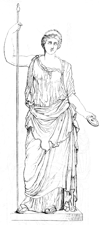 Greek Goddess Hera